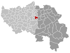 Gemeentekaart, eigen werk